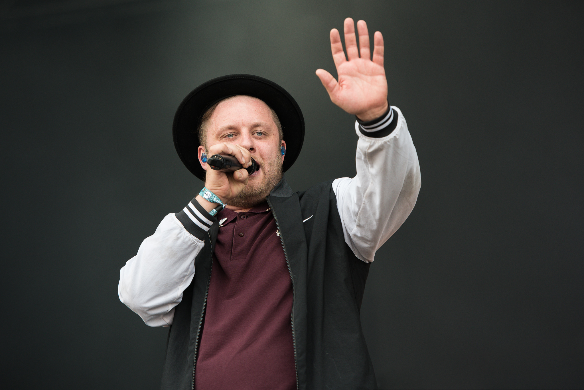 Anton Schneider,Deichbrand,ESK Events & Promotion GmbH,Fatoni,Festival,Konzert,Livekonzert,Livemusik,Sea-Airport Cuxhaven/Nordholz,See-Flughafen Cuxhaven/Nordholz,Seeflughafen Cuxhaven/Nordholz,Water Stage